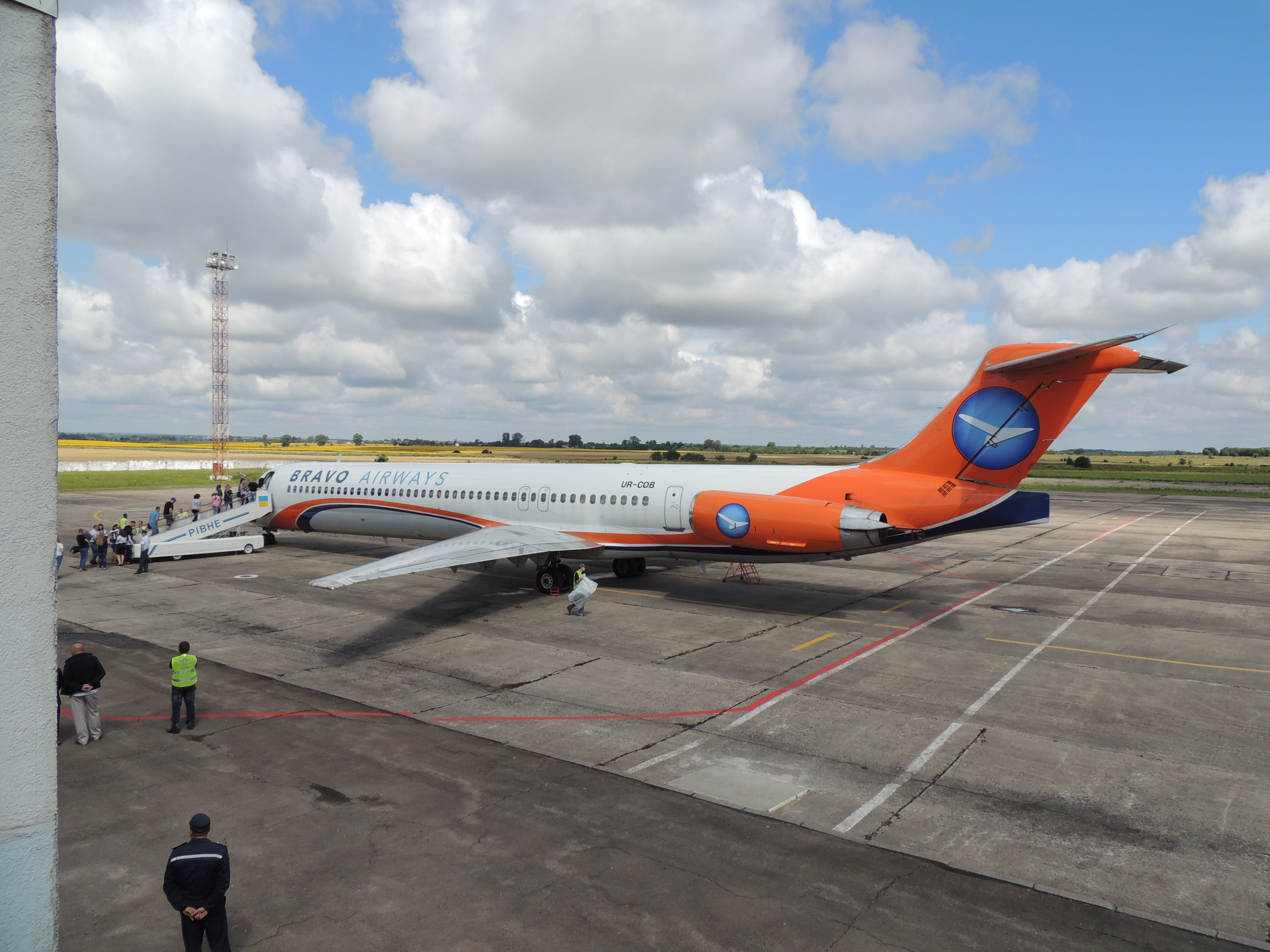 Перший рейс до Анталії